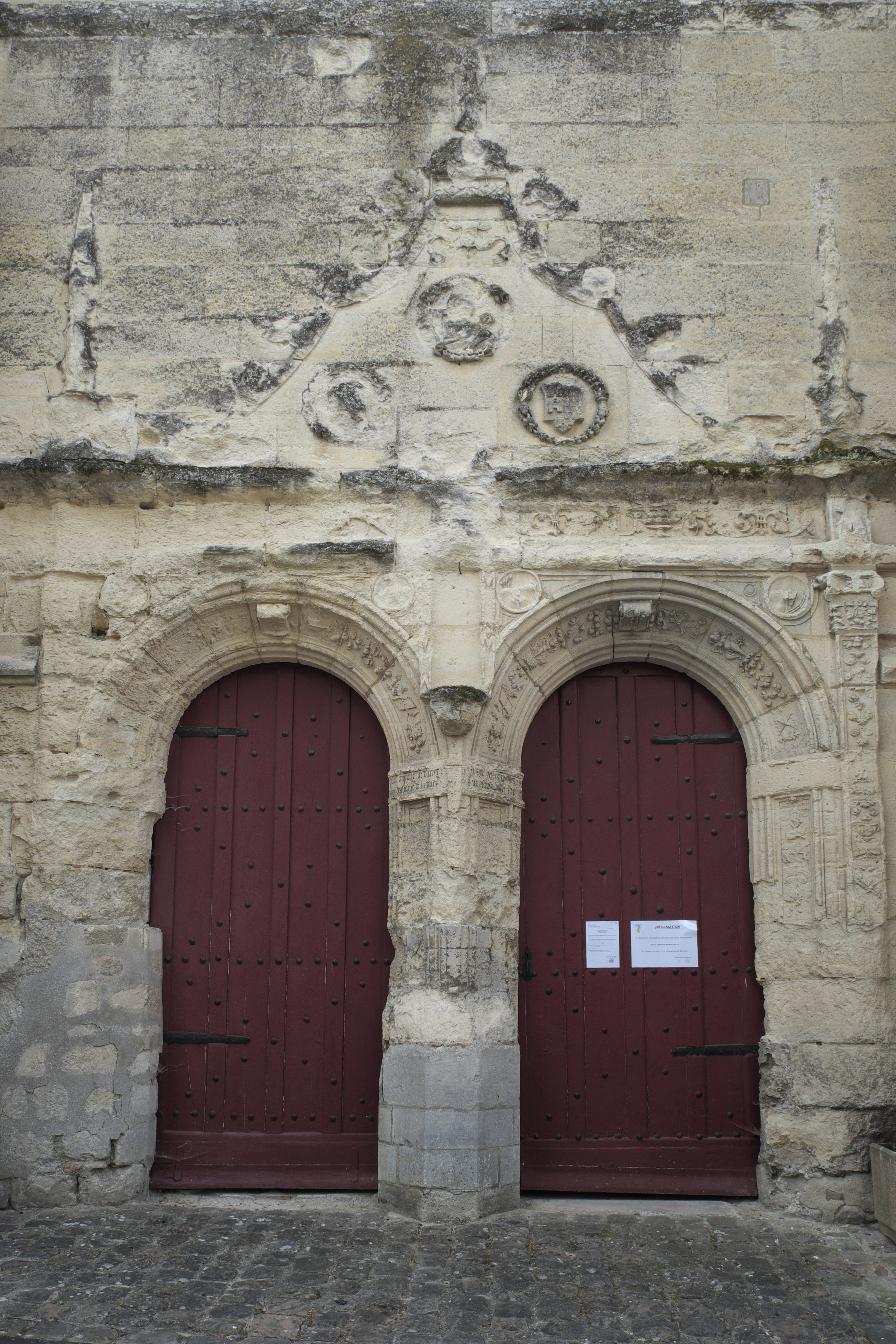 Katholische Pfarrkirche St-Cyr-Ste Julitte in Crouy-sur-Ourcq im Département Seine-et-Marne (Region Île-de-France/Frankreich), Westportal